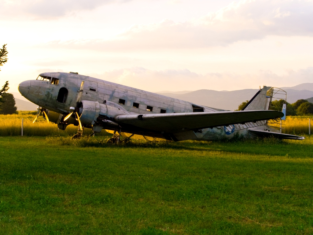 Zračna luka Otočac